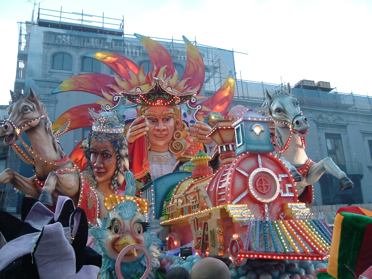 Torrisi Seby, Torrisi Seby, Carnevale di Acireale - Carro allegorico Grottesco Vincitore 2006